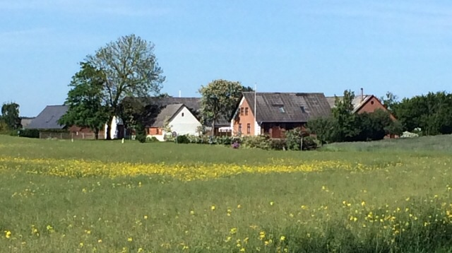 Glargårde, Visborg Sogn. Beliggende under 1 km fra Hadsund.